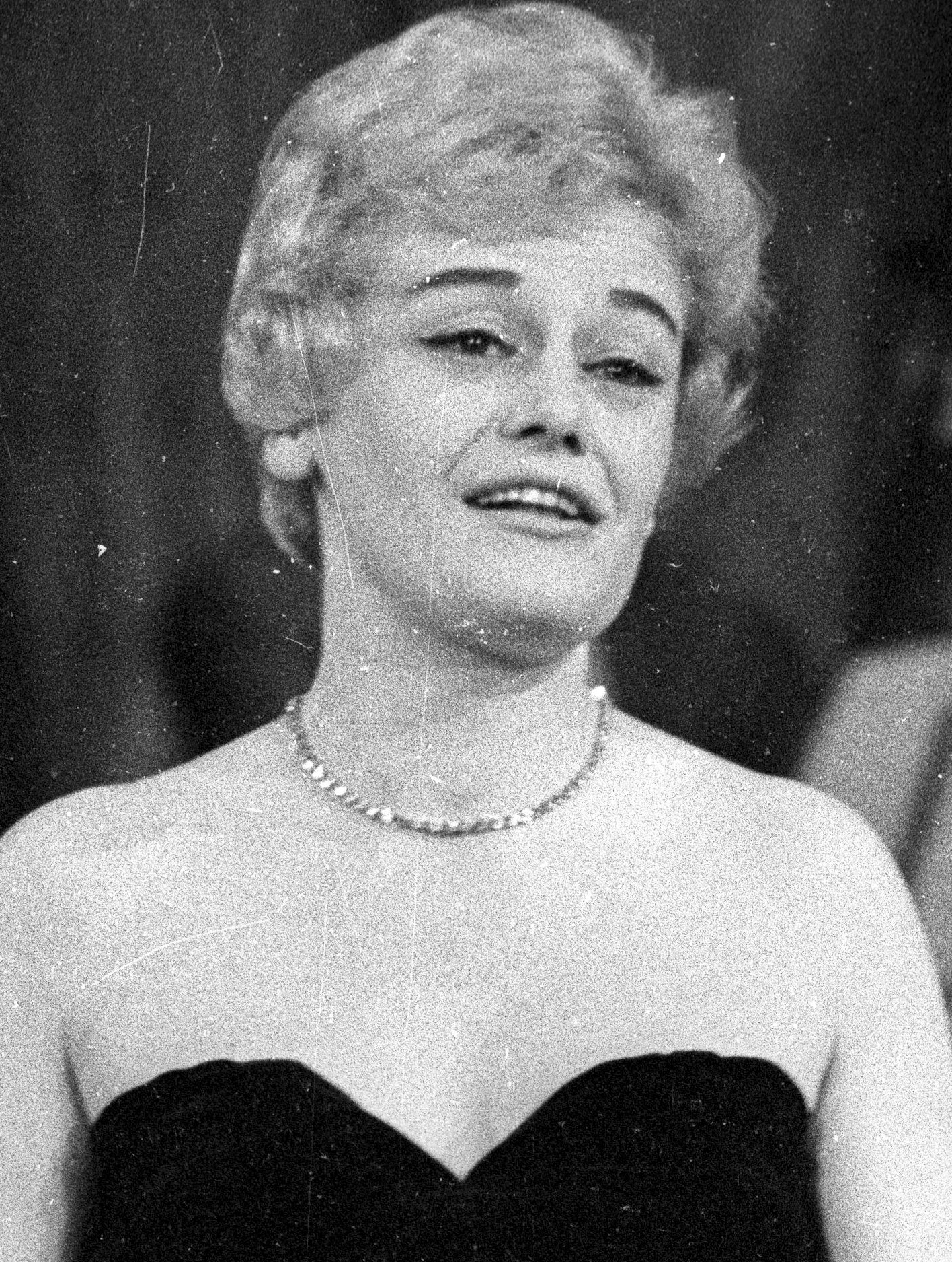 Kovács Erzsi magyar énekesnő, előadóművész.